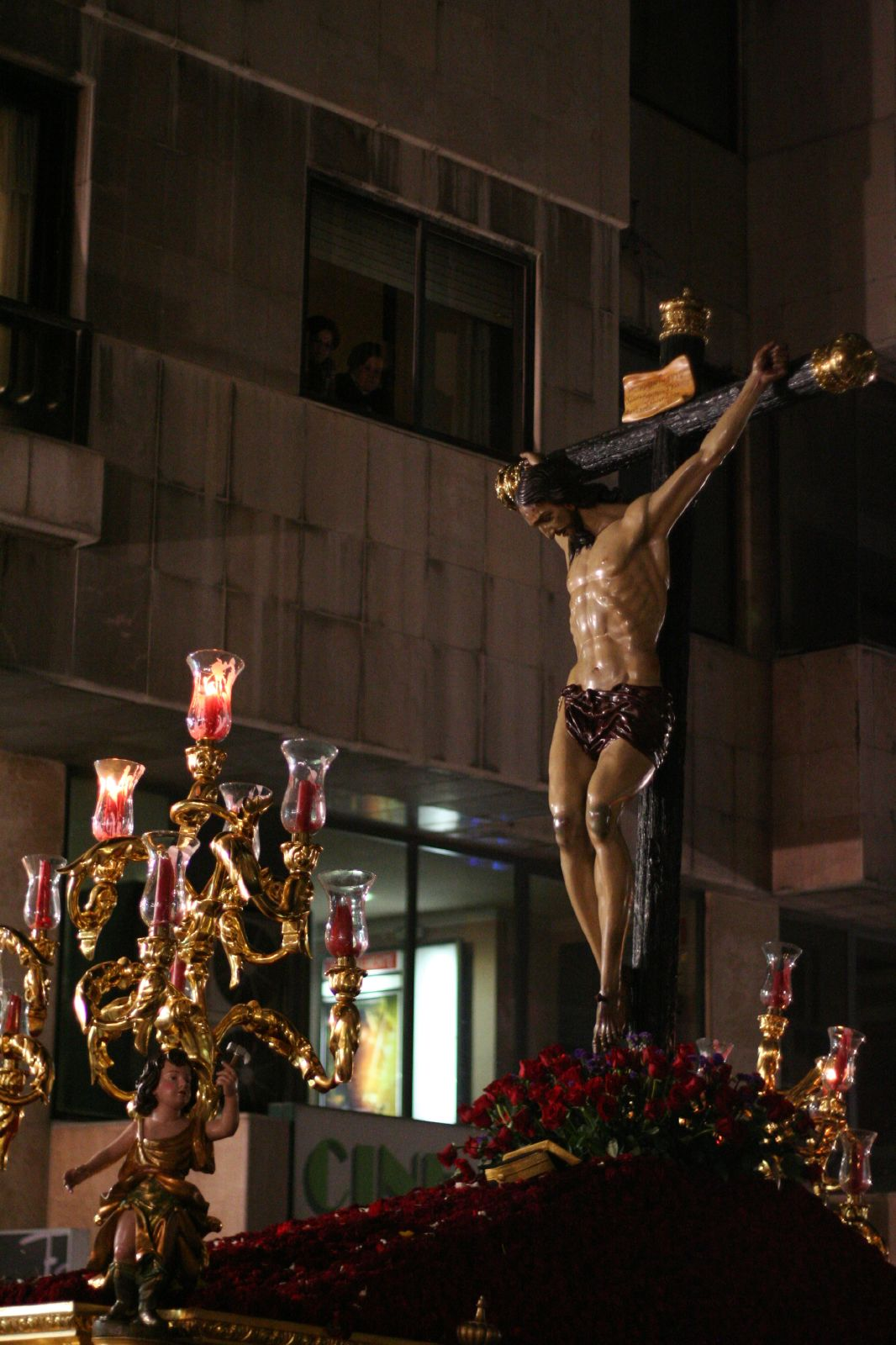 Santísimo Cristo de la Vera-Cruz de Jaén el Jueves Santo de 2008. En el monte hay un tricornio en recuerdo de los Guardias Civiles muertos en acto de servicio.